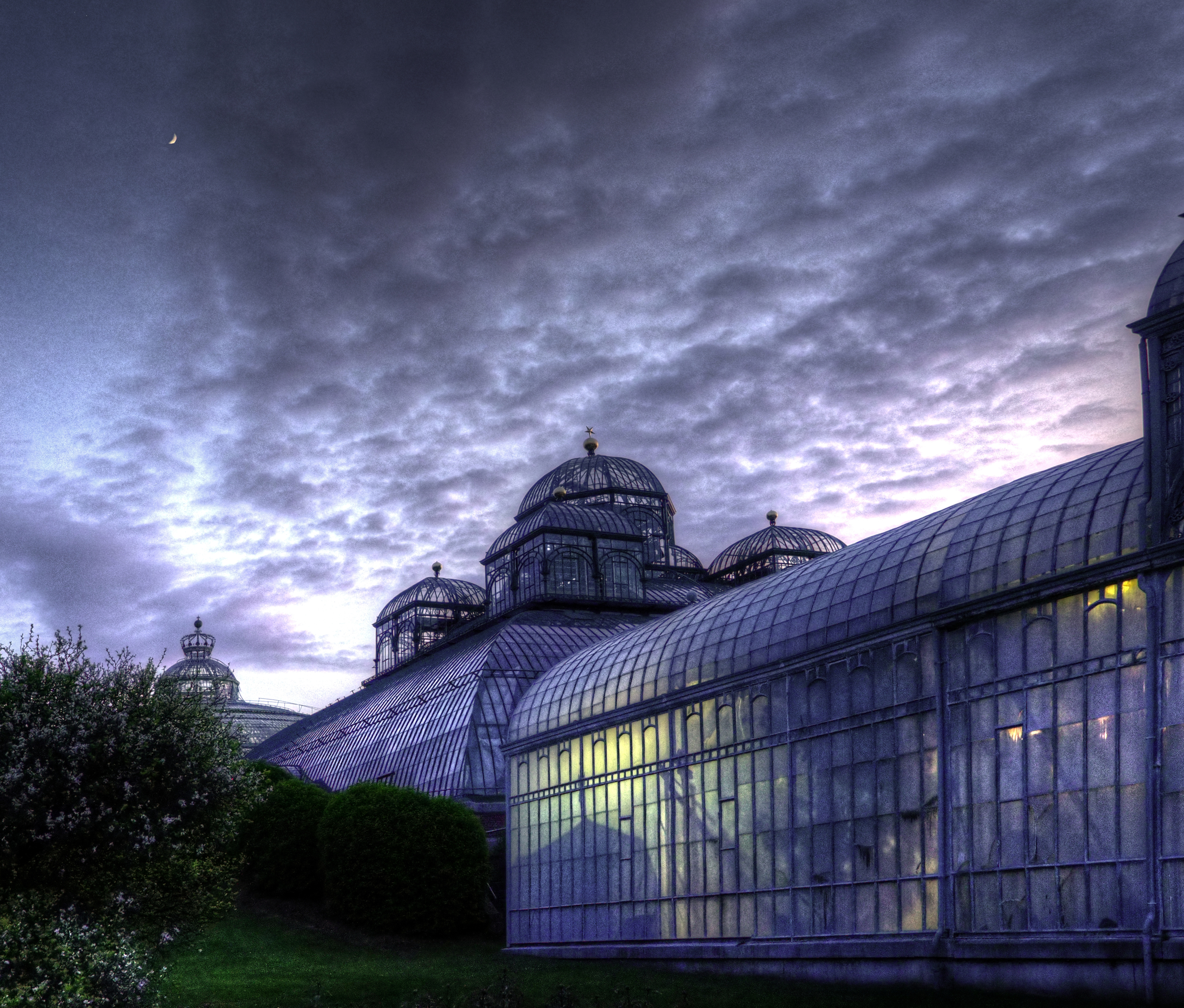 Vue des serres royales sous la lune